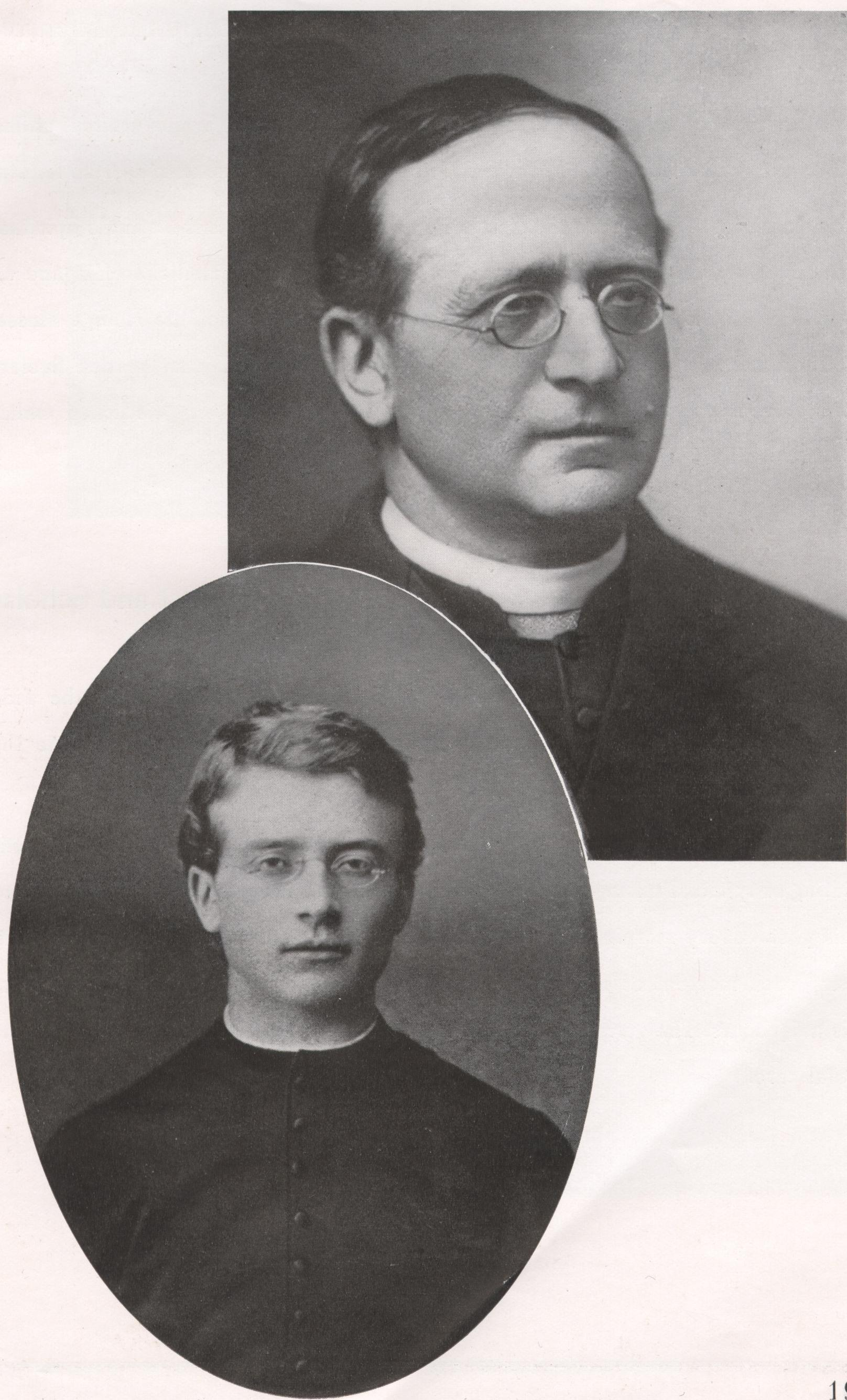 Pius XI. als junger Priester